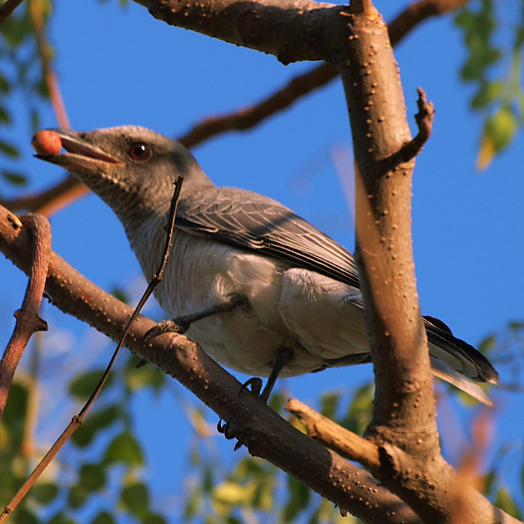 Coracina macei macei, Gujarat